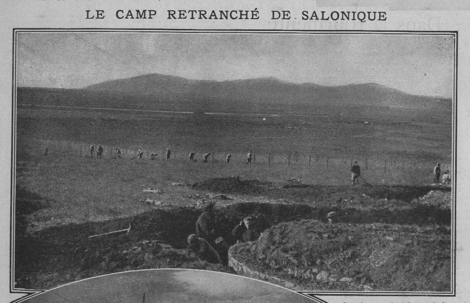 Camp retranché de Salonique, les troupes françaises creusent des tranchées pour défendre la ville. Le Pays de France du 10 février 1916.